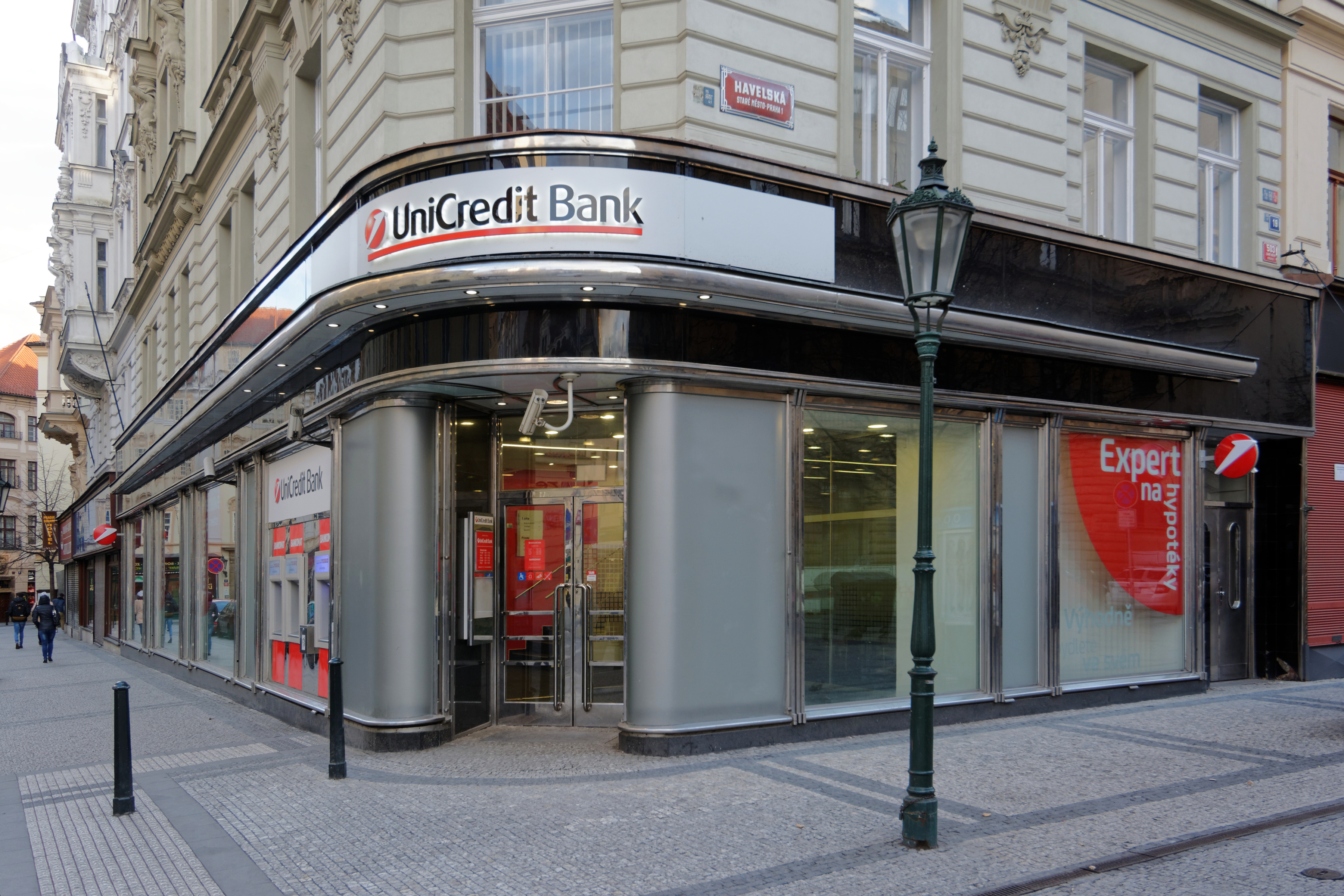 Dům čp. 503, Praha 1-Staré Město, Havelská 19, Melantrichova 4. V přízemí zachovány výkladce od Maxe Gerstla ze 30. let 20. století. Nároží Havelské a Melantrichovy ulice.